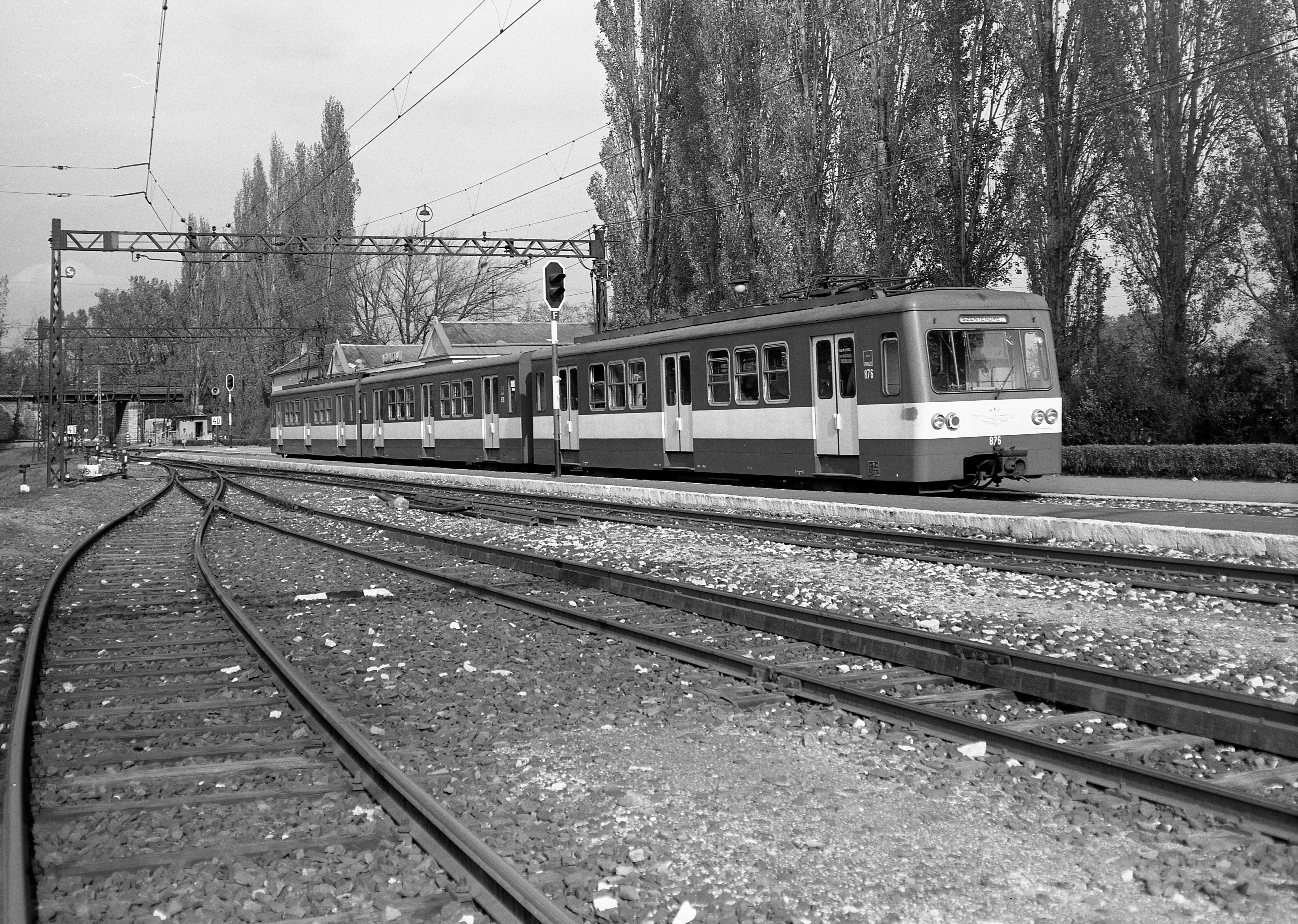 Aquincum, HÉV megálló. Location: Hungary, Budapest III. Tags: Budapest Title: Aquincum, HÉV megálló.